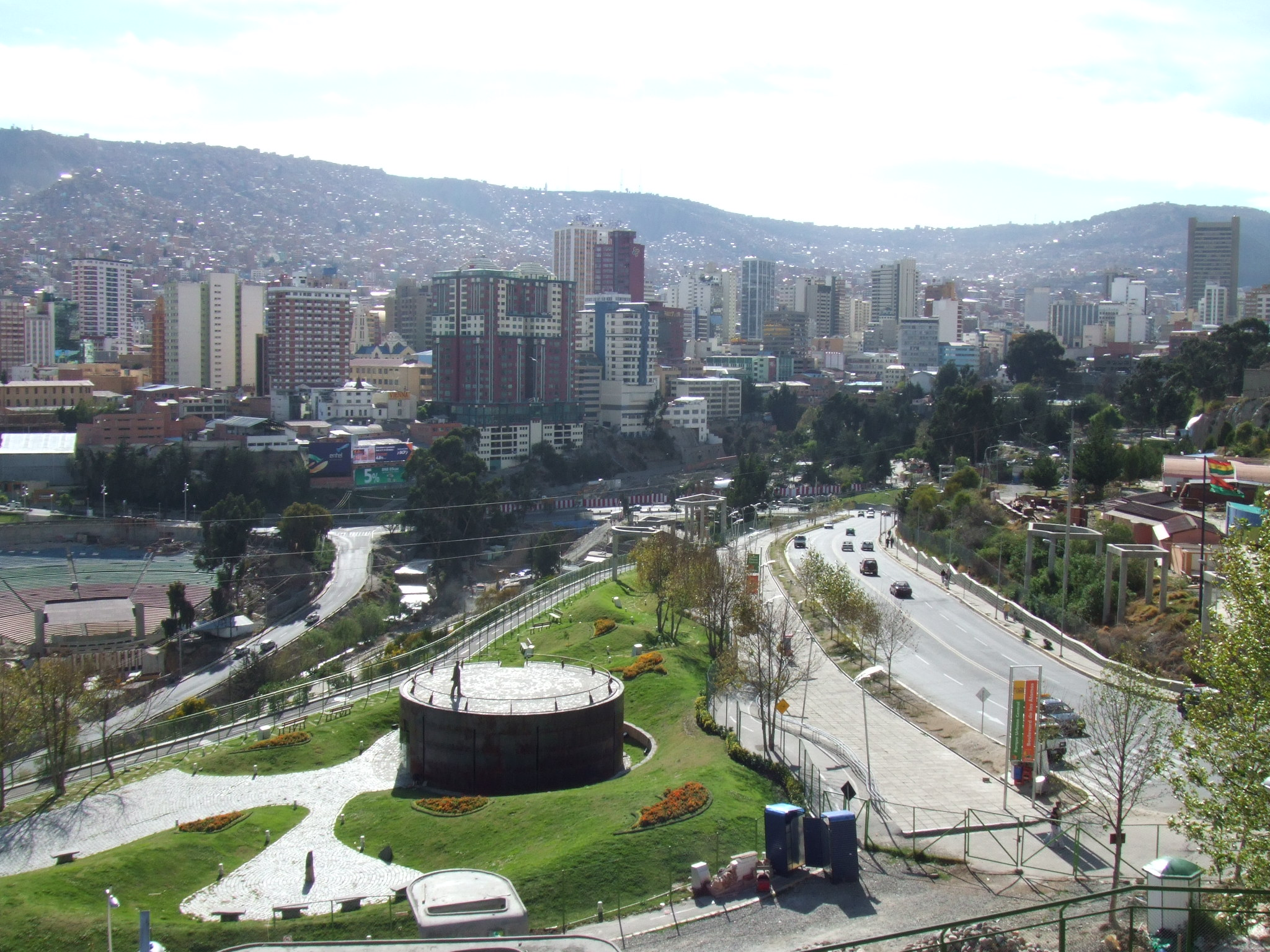 vista parcial de la ciudad de La Paz capital administrativa de Bolivia.